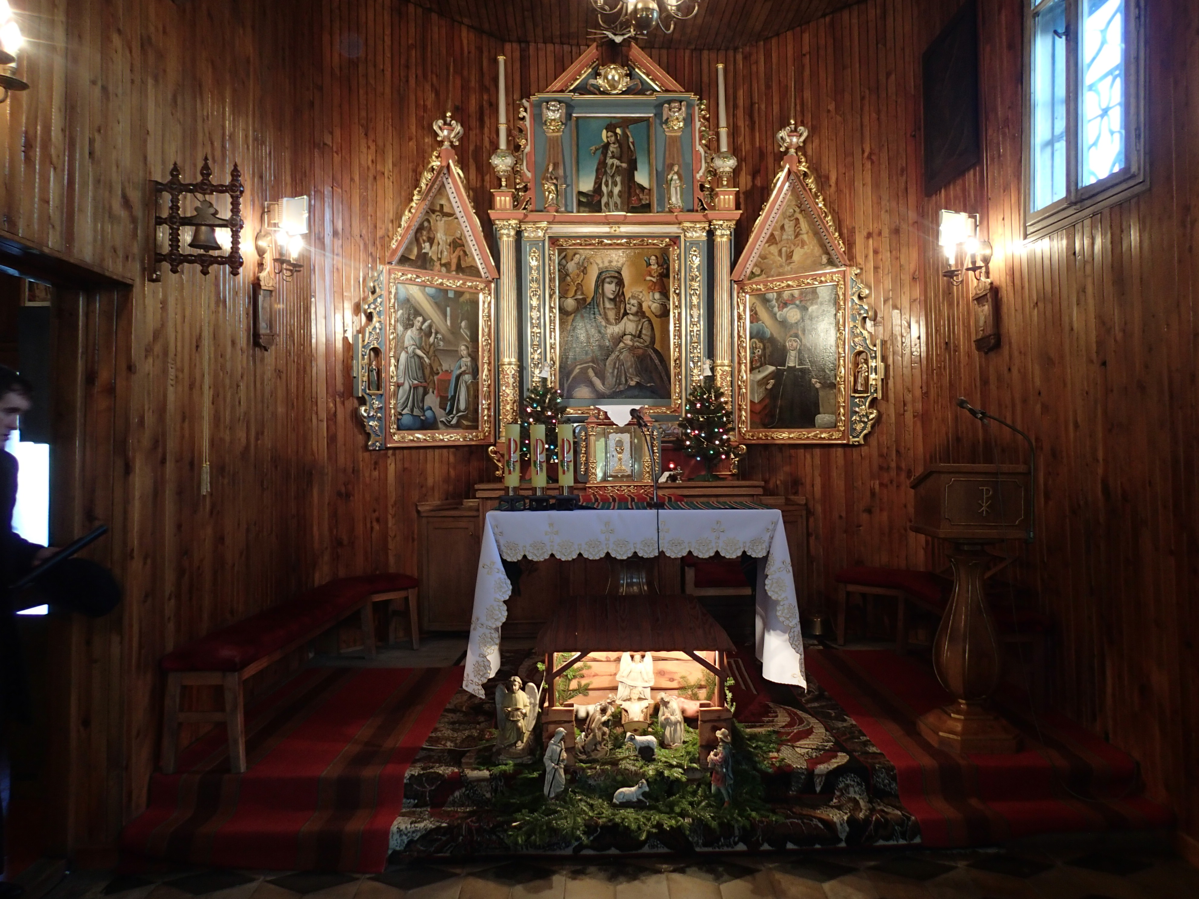 Ołtarz w Kościele Św. Heleny w Nowym Sączu